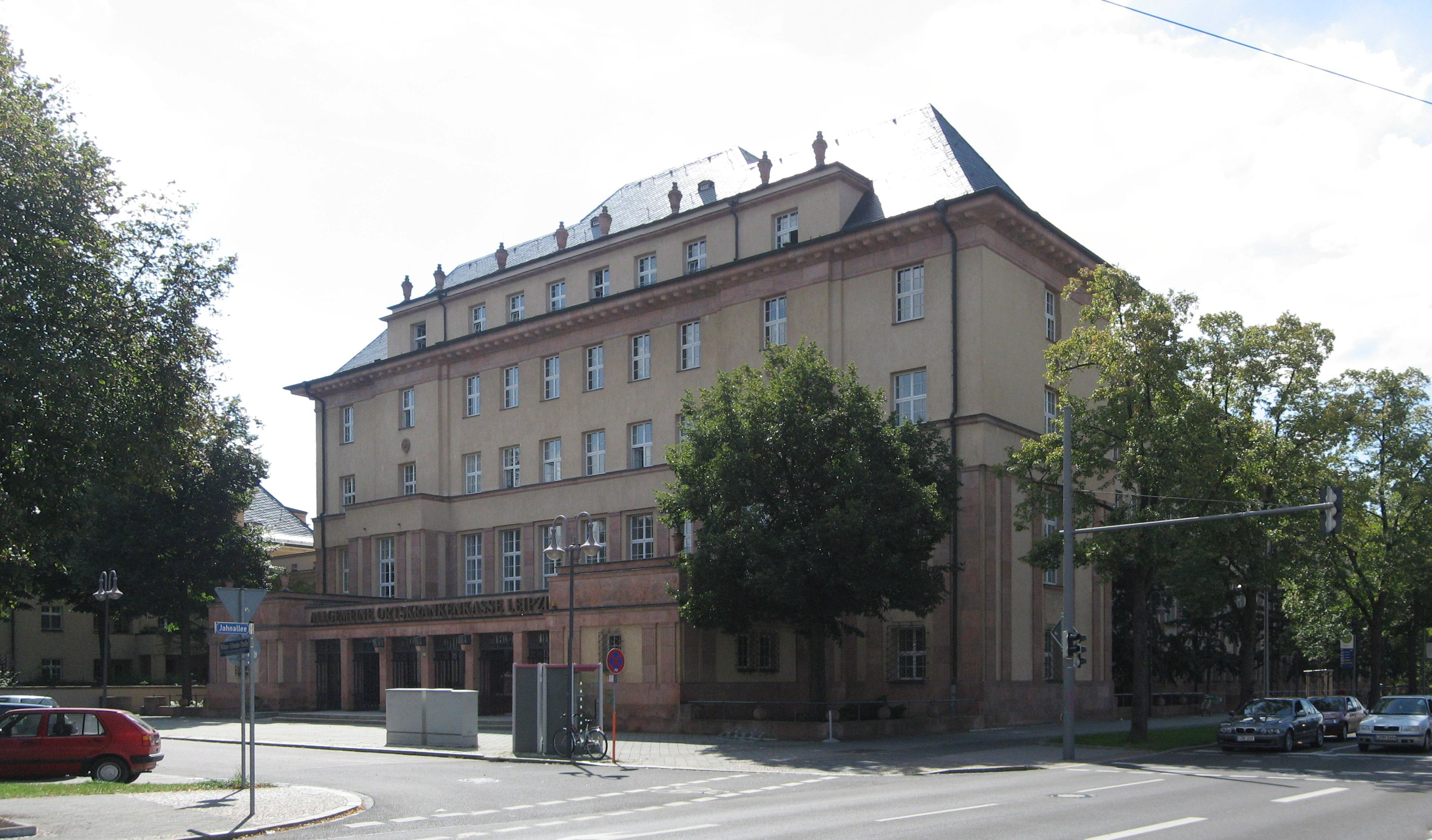 Leipzig, AOK-Gebäude, Haupteingang, erbaut 1922–1925 von Otto Droge; 1952–1962 Arbeiter-und-Bauern-Fakultät und 1963–1989 Studentenwohnheim der DHfK